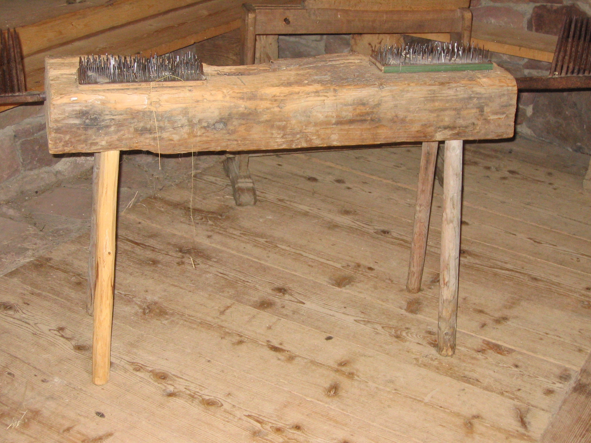 Riffelbrett im Freilichtmuseum Neuhausen ob Eck